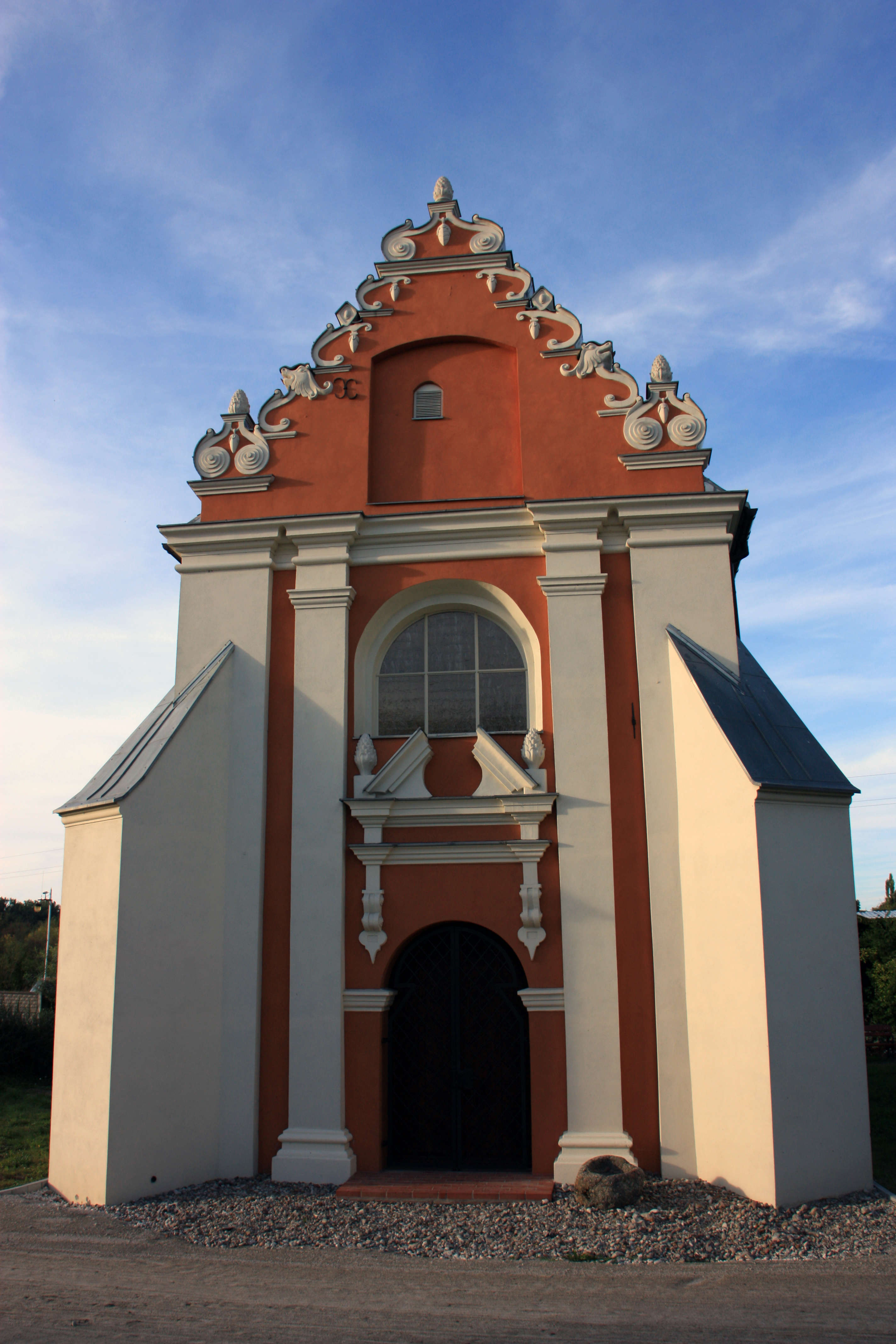 zespół kalwarii, XVII-XIX w.: 25 kaplic; tzw. klasztorek (plebania) Pakość Kapliczka - Wniebowzięcie NMP